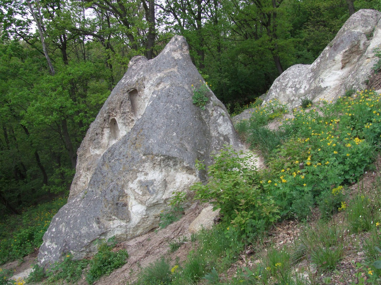 B7a, Szomolya, Kaptár-rét, 8. szikla